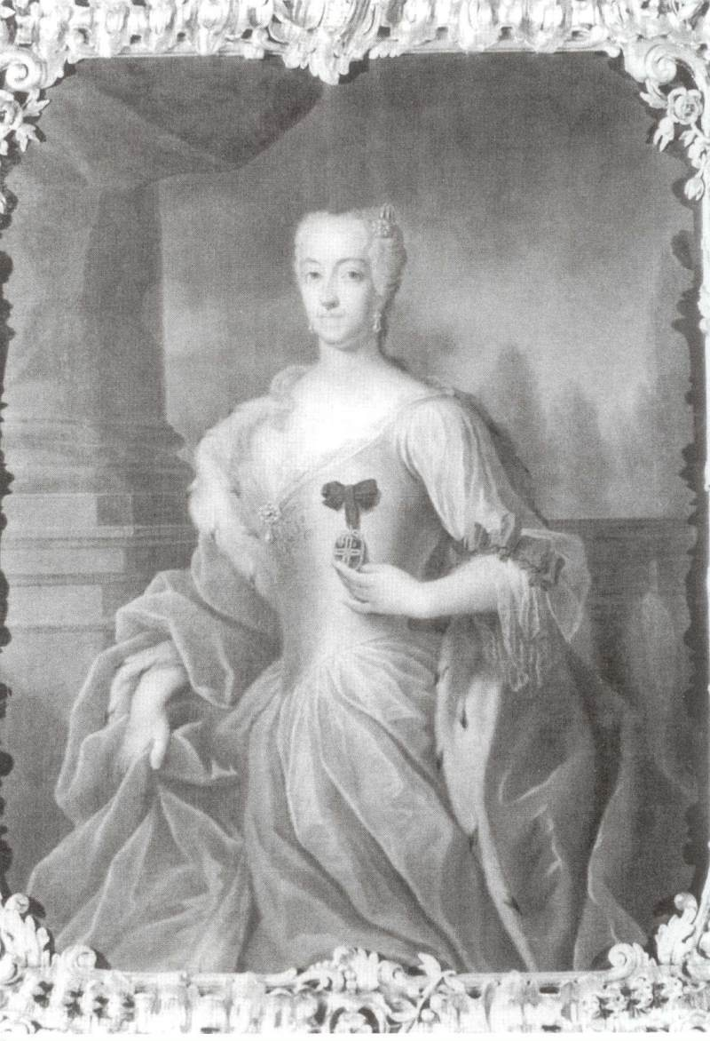 Portret Anieli Teresy z Michowskich Zamoyskiej